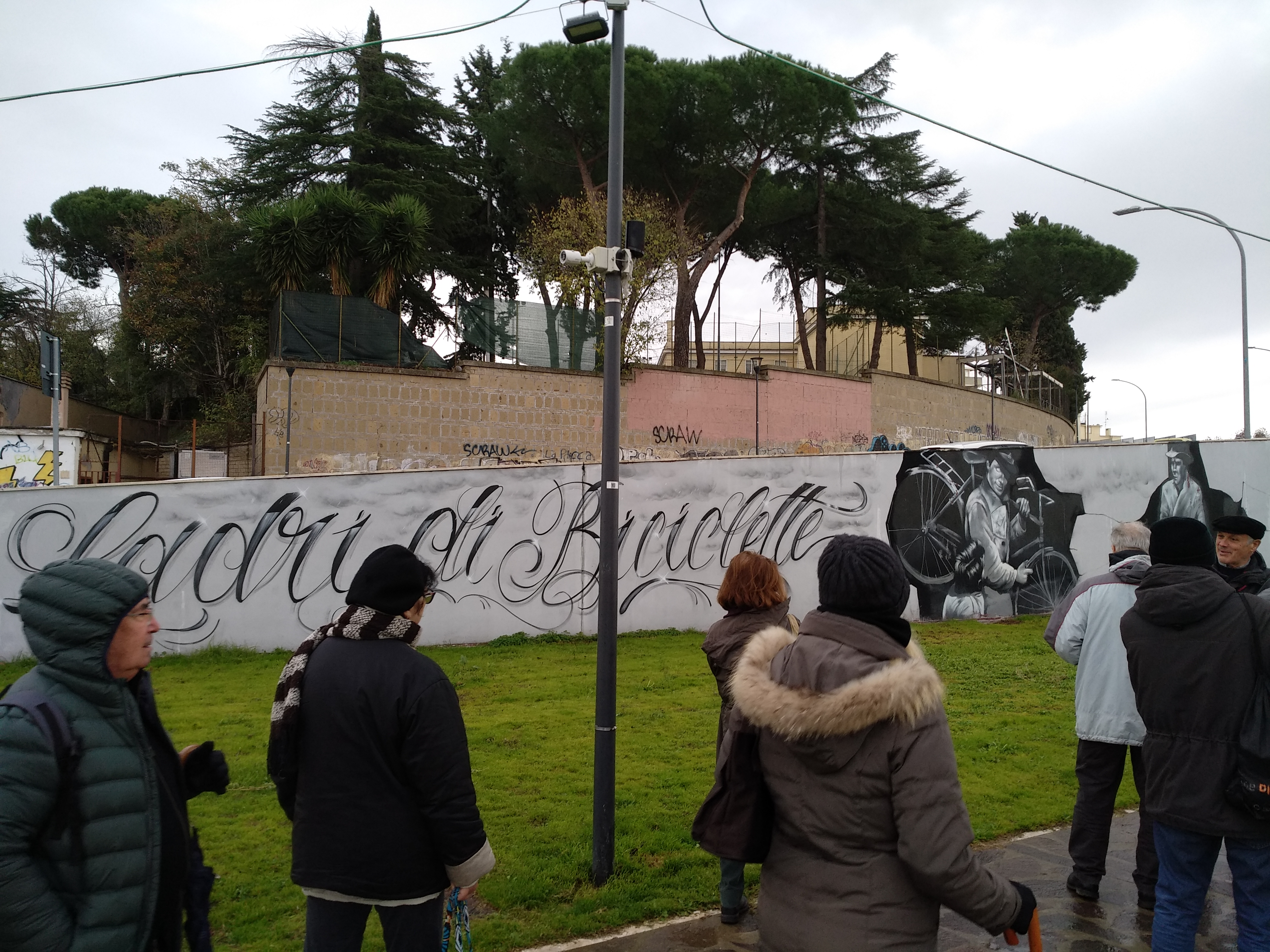 il gruppo "Visure Acatastali" in visita al Tufello nel 2018